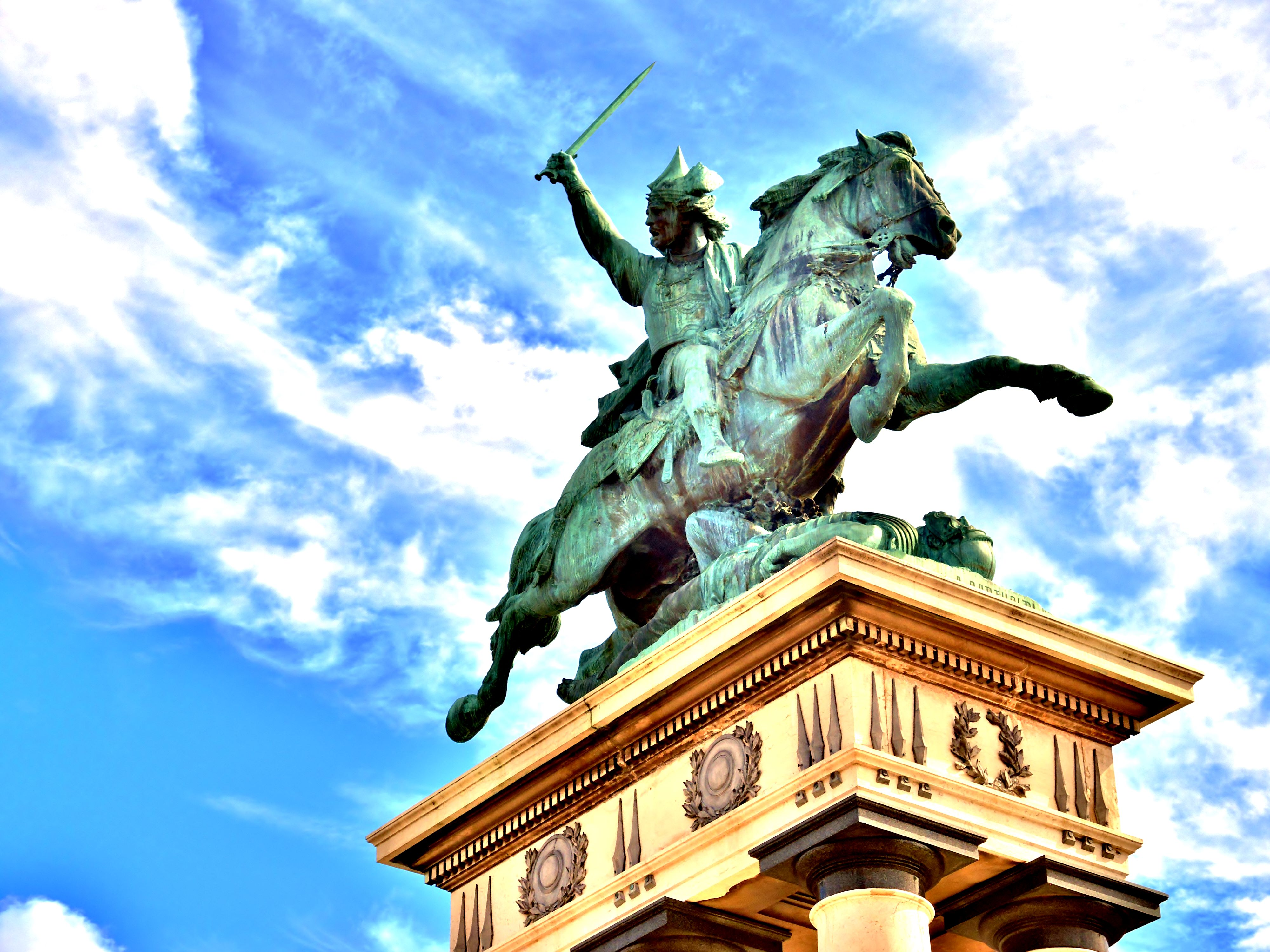 Statue de Vercingétorix. Clermont-Ferrand. Puy-de-Dôme